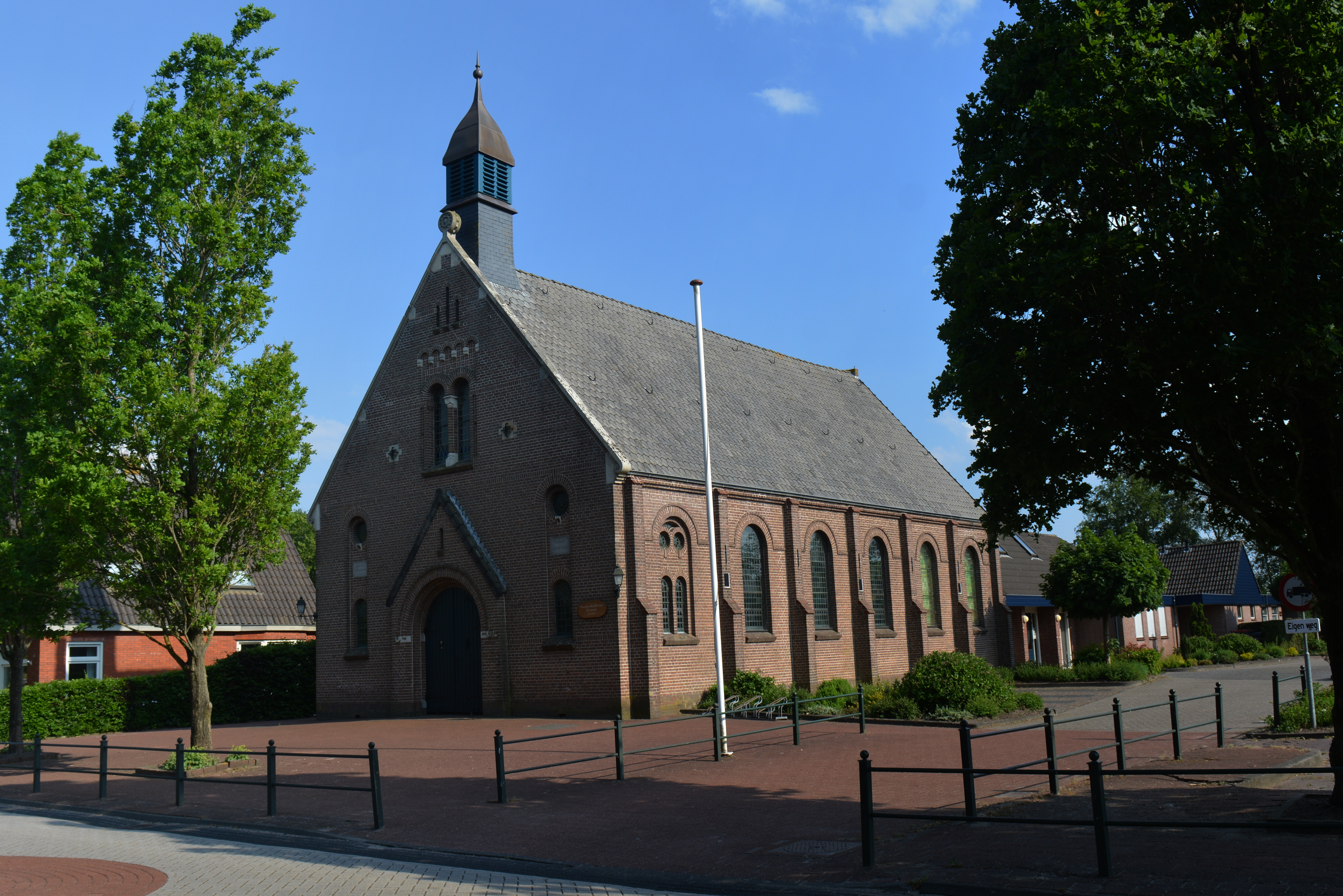 Donkerbroek, grifformearde tsjerke